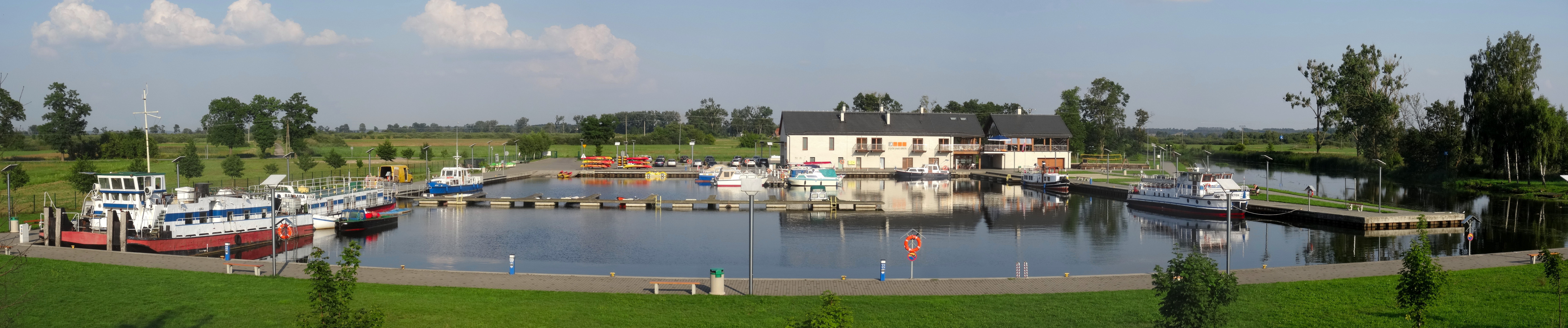 Przystań powiatu nakielskiego na Noteci w Nakle